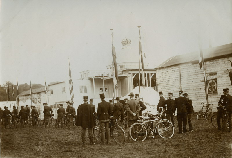 Uit een foto-album met 57 afbeeldingen van de Tweede Nationale Sportdagen van 26 september tot en met 4 oktober 1909 in Park Zorgvliet, Den Haag: regiment wielrijders